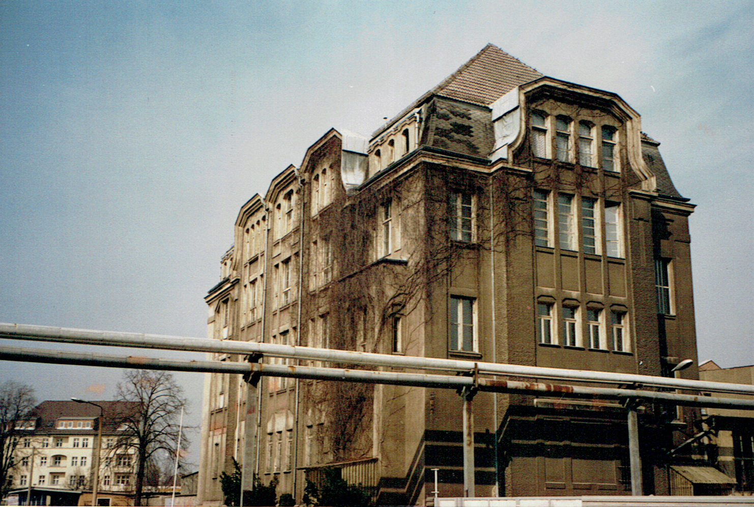 Villa Heike ehem. NS-Archiv des Ministeriums für Staatssicherheit um 1991